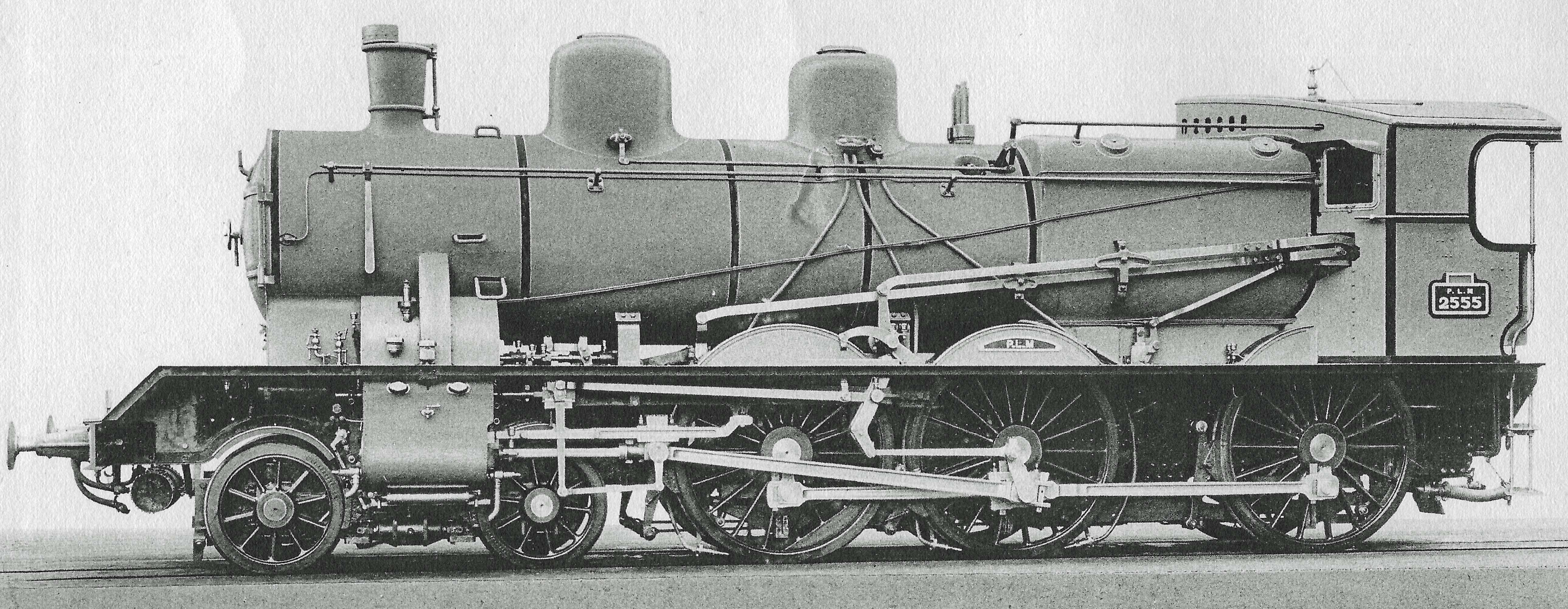 Locomotive PLM 2555 série 230C